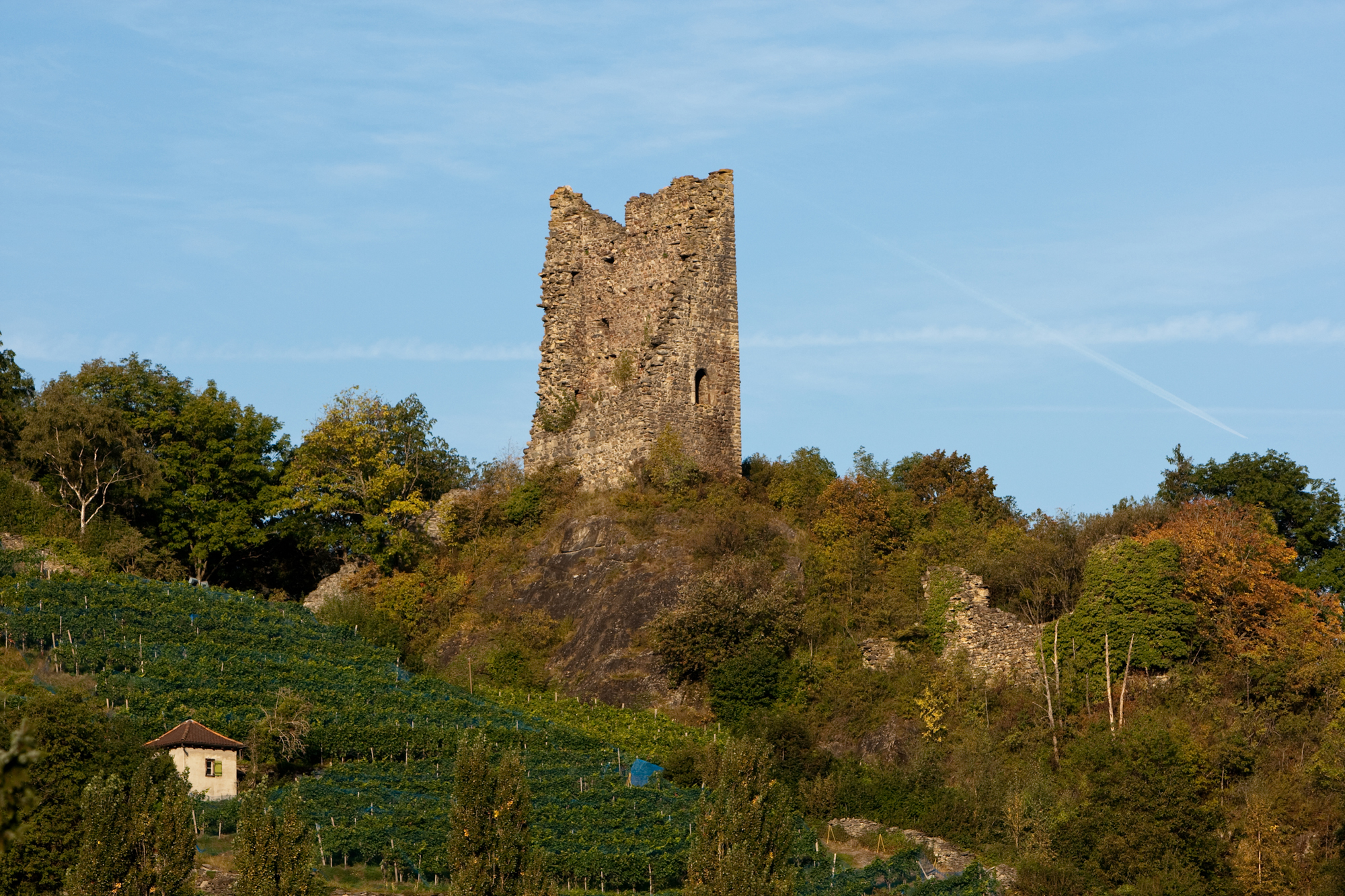 Burgruine Freudenberg in Bad Ragaz